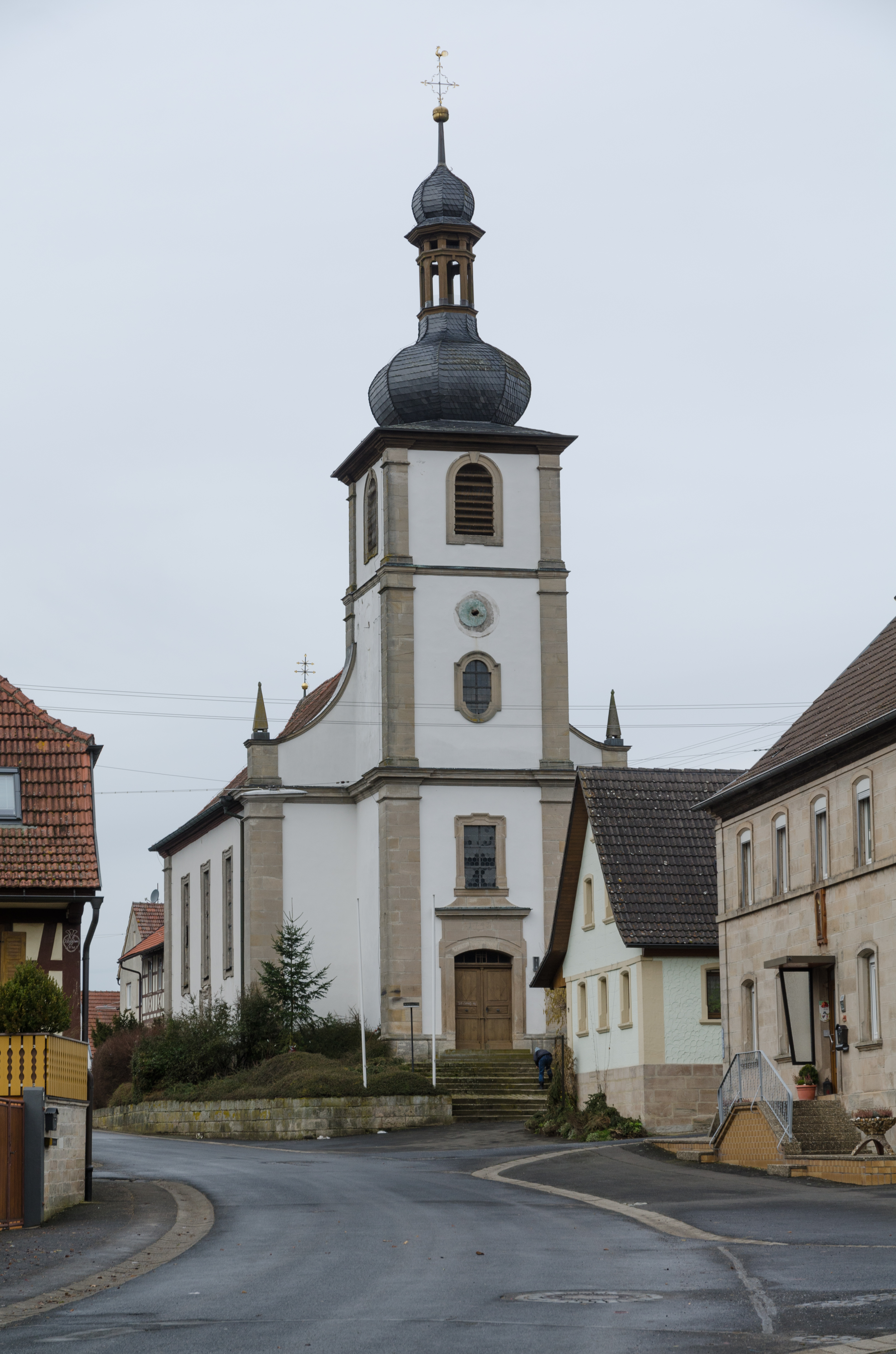 Bundorf, Neuses, Hl. Kreuz Kirche